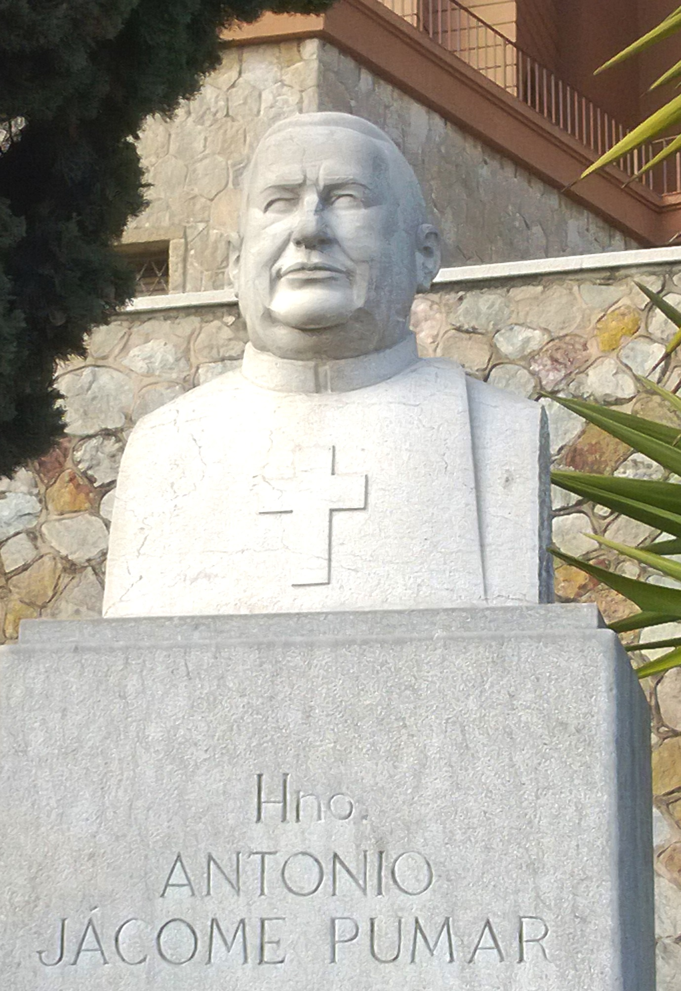 Bust d'Antonio Jácome, fundador dels Germans Camils dels Malalts Pobres, als jardins de la casa mare de Barcelona, al Guinardó.